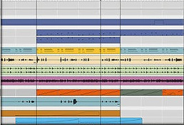 Audio Tracks